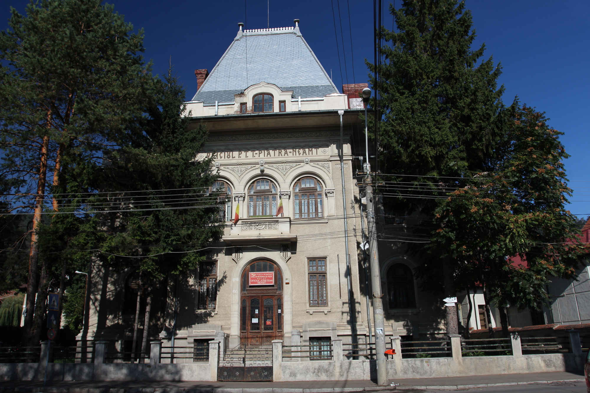 Poșta centrală